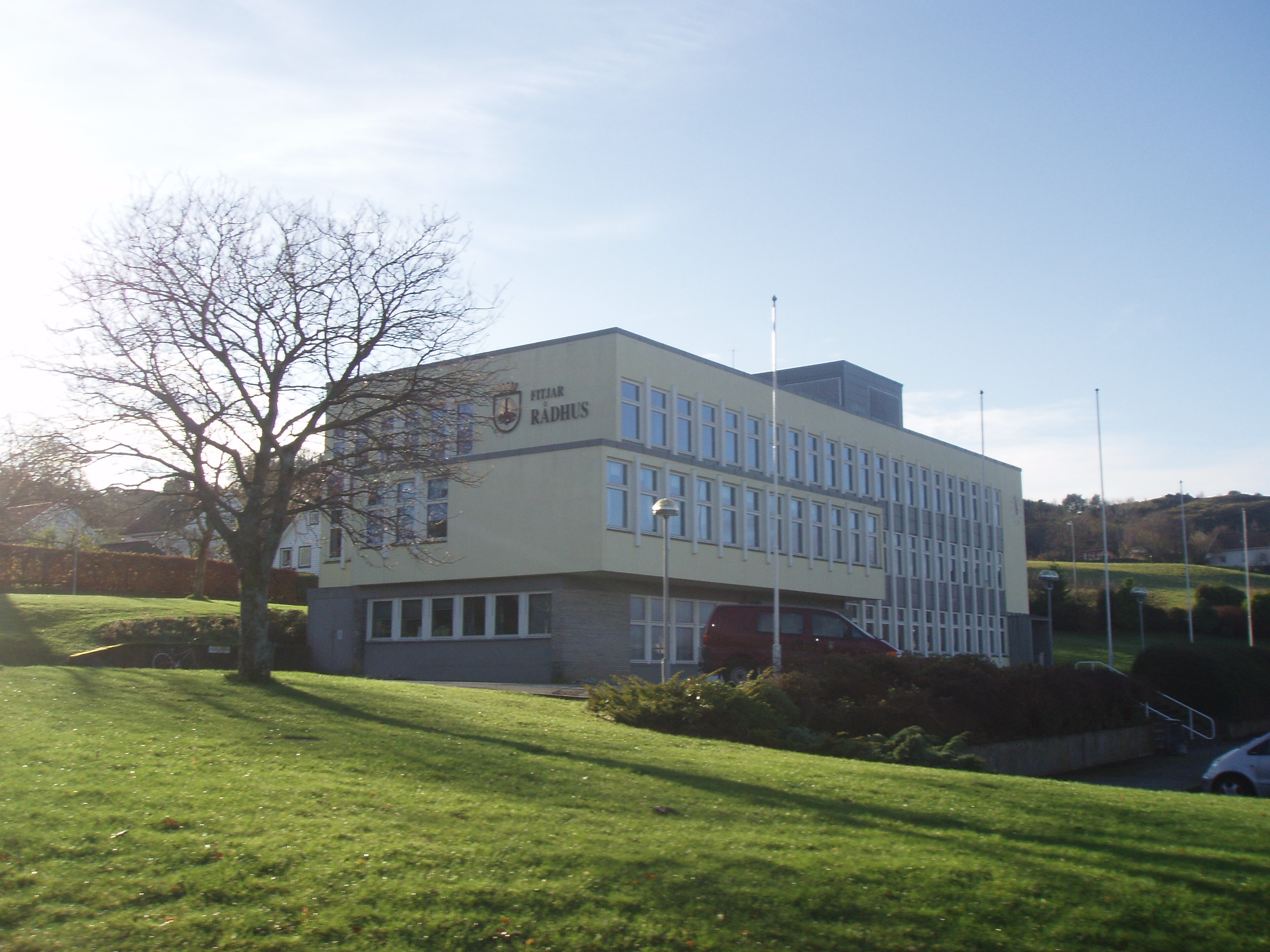 Fitjar Rådhus - Town Hall at Fitjar